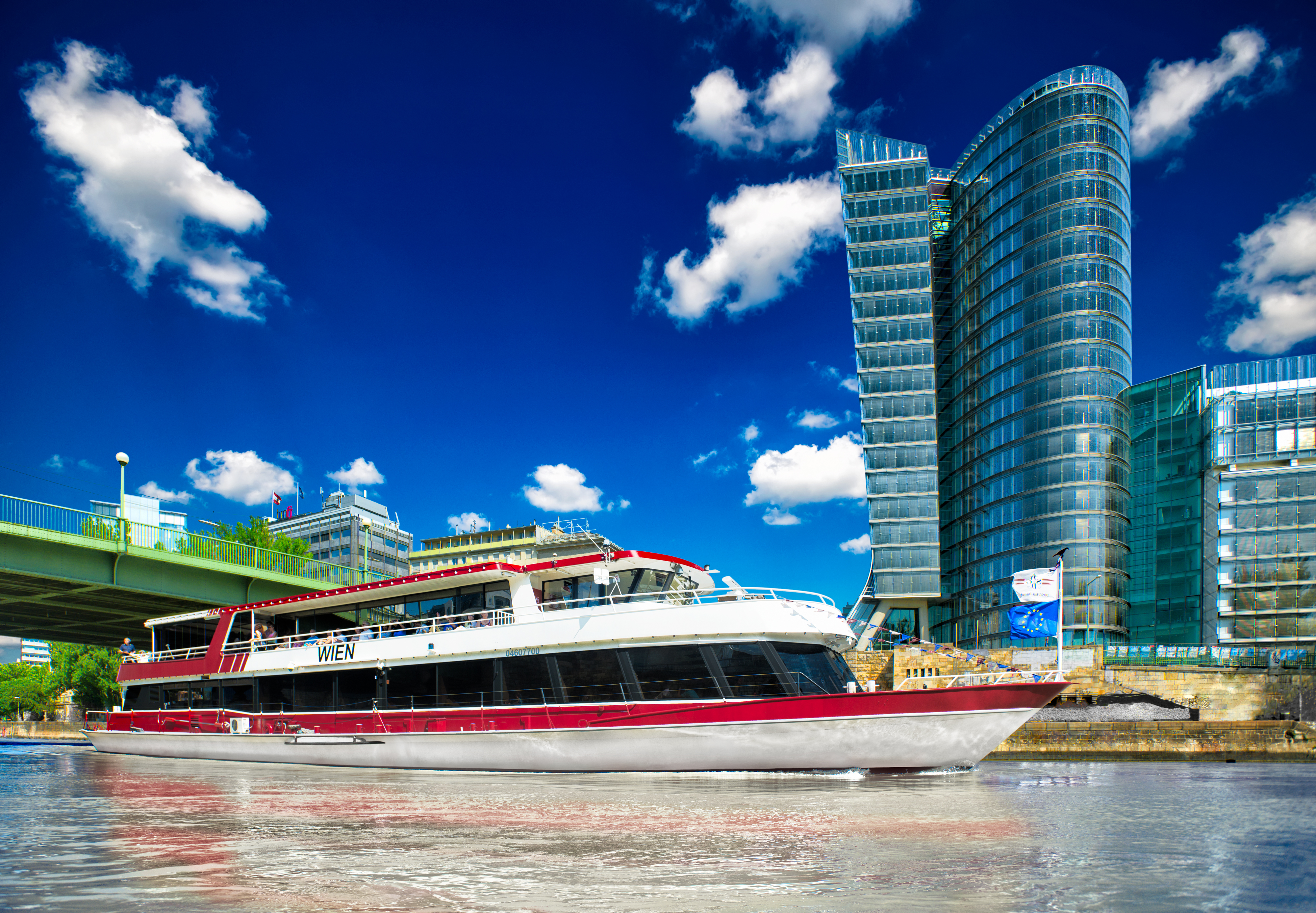 (c) DDSG Blue Danube - Dieter Lampl